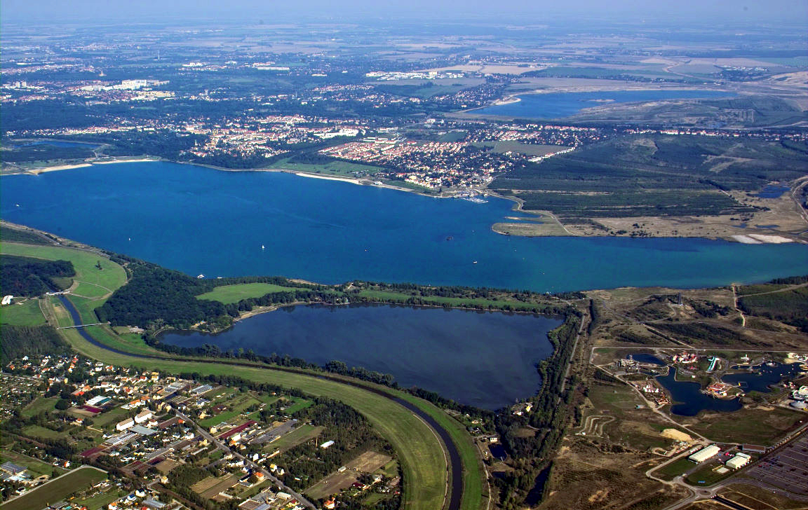 Luftbild vom Cospudener See in der Mitte. Im unteren Teil der Elterstausee. Im oberen Bildteil der Markkleeberger See